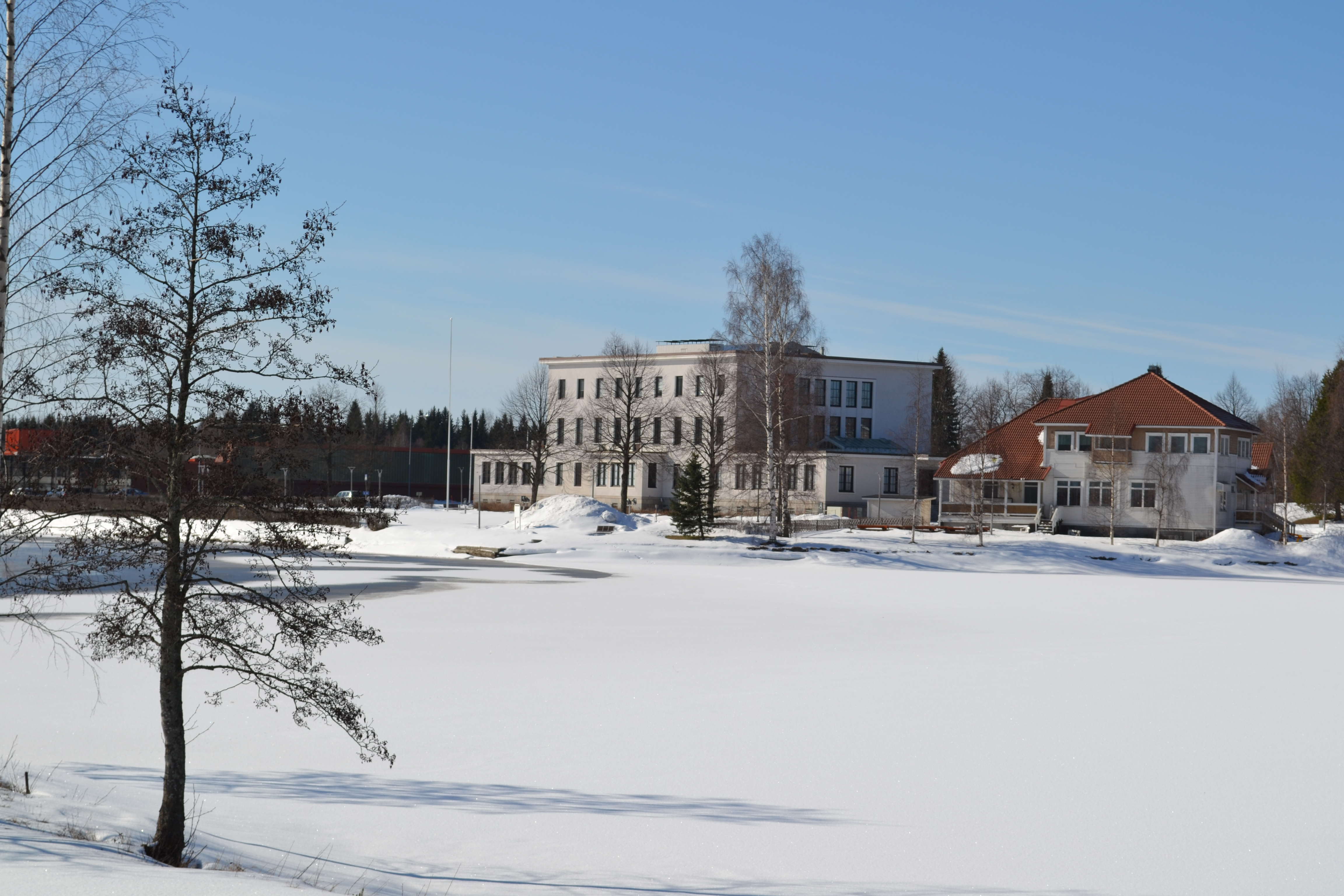 Serlachius-museo Mäntässä